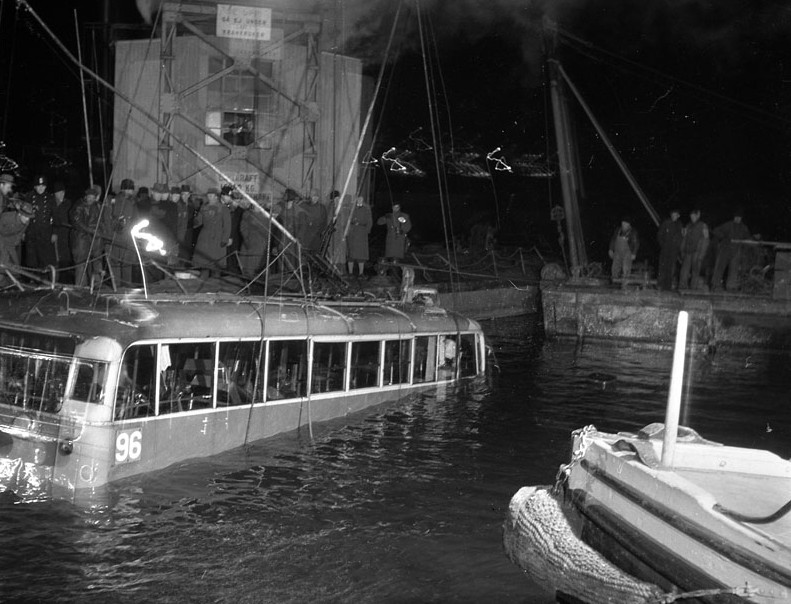 Sundet mellan Lilla- och Stora Essingen. Buss på linje 96 bärgas efter olyckan på Stora Essingebron. (Krock med lastbil. Bussen störtade genom broräcket. 11 personer omkom och 1 överlevde)